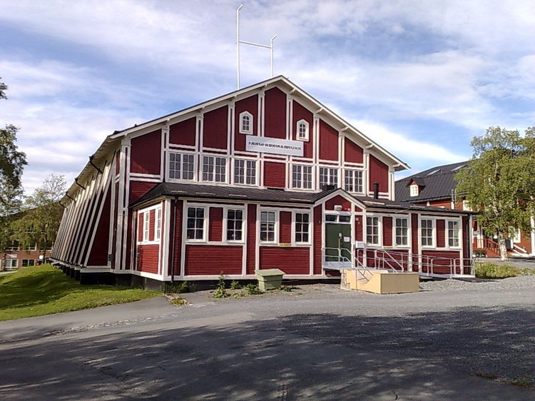 Färgfabriken norr i Östersund